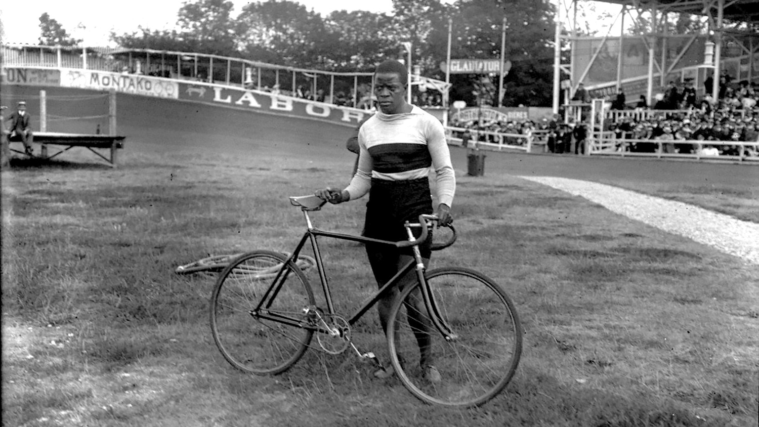 Major Taylor [cycliste, stade Buffalo] : [photographie de presse] / [Agence Rol]